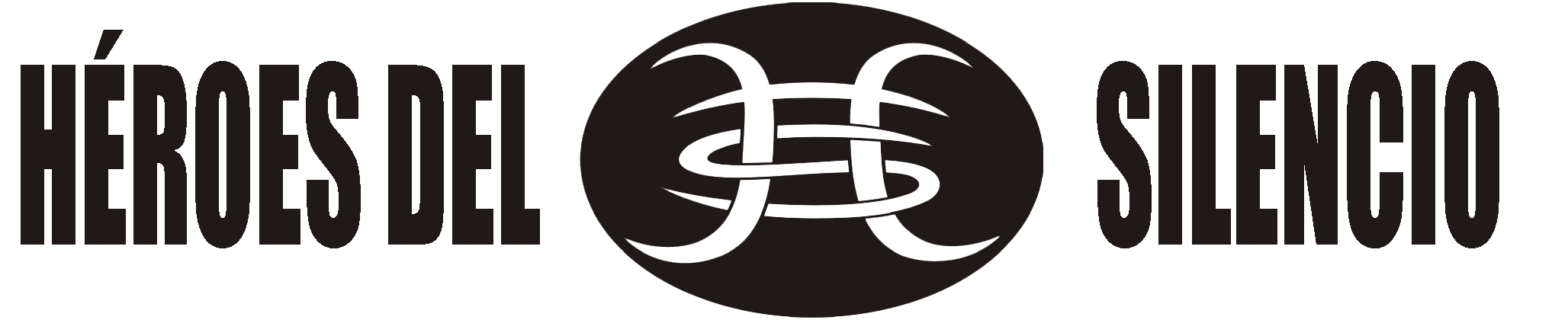 logo HDS con anagrama HS